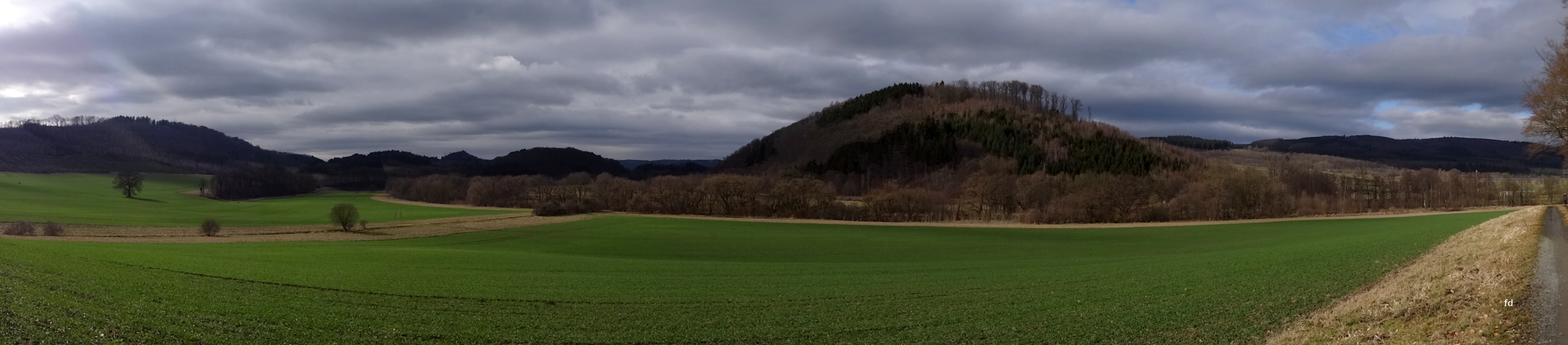 Panorama Ruhrtal Laer - Stockhausen mit NSG Schneisenberg (Hügel rechts)